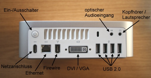 Schnittsellen an der Rückseite des Mac mini (2. Generation) mit x86 Architektur